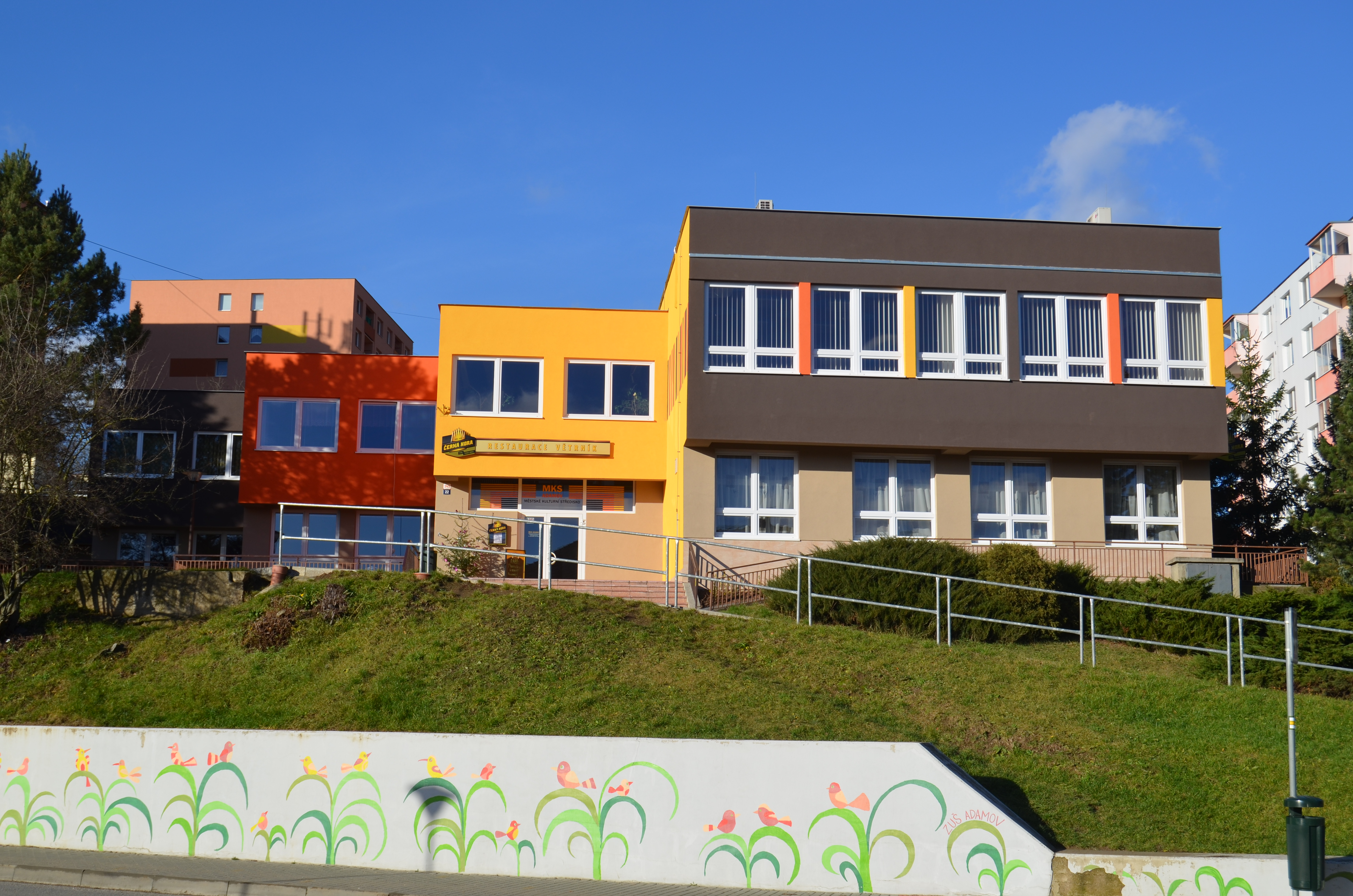 Městské kulturní středisko v Adamově po rekonstrukci fasády v roce 2014